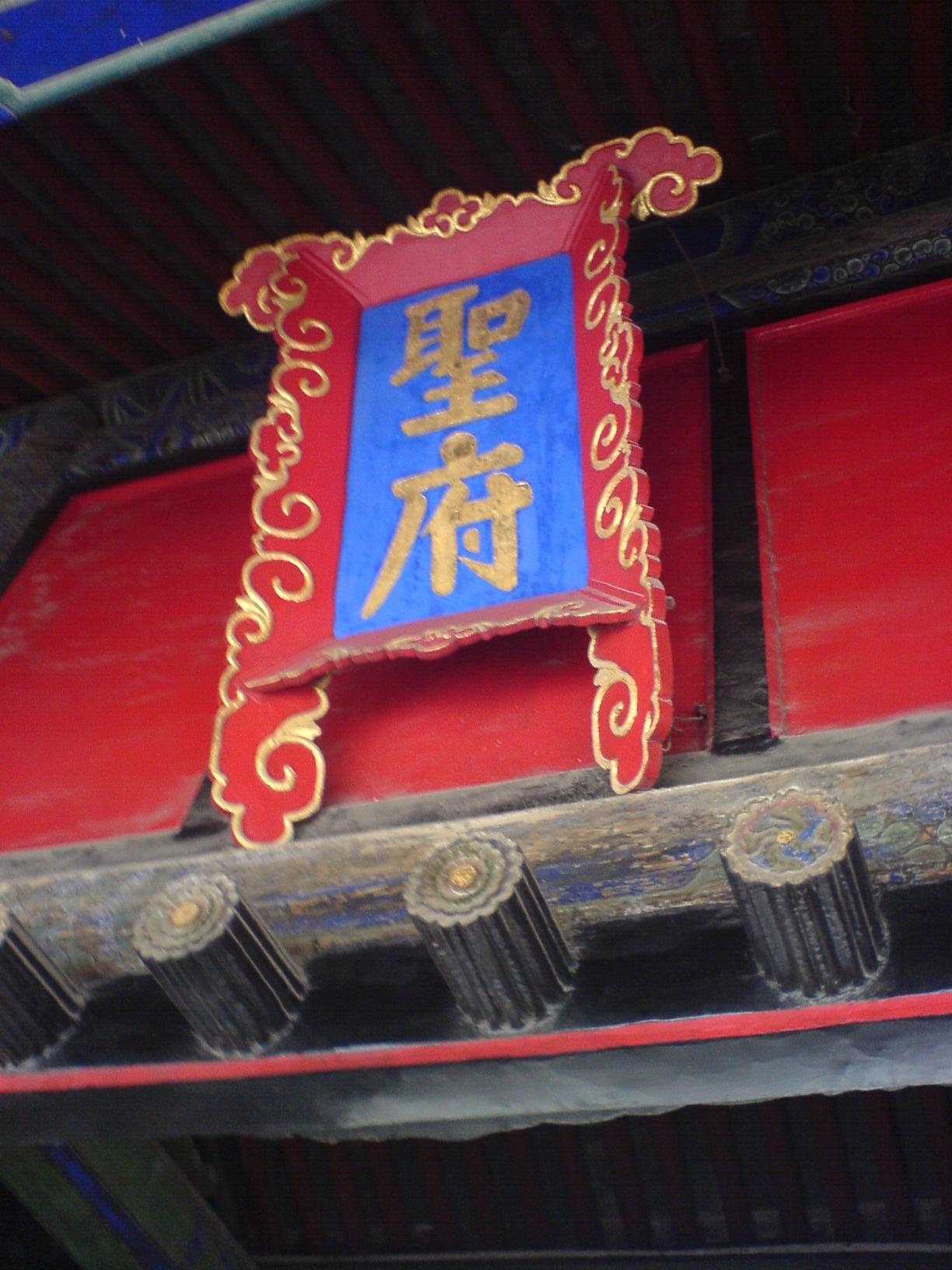 曲阜孔府大門的「聖府」牌匾